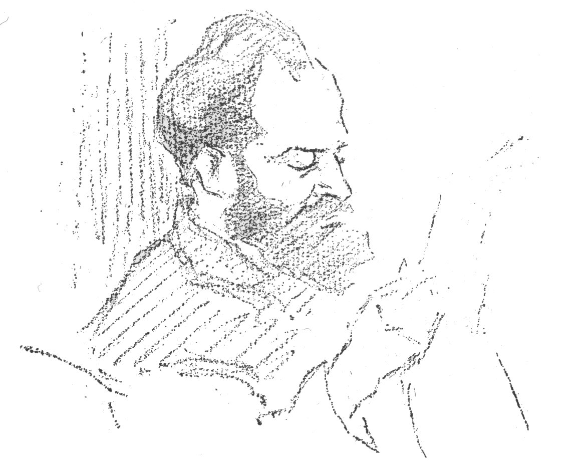 Mijaíl Liber en la Conferencia Estatal de Moscú (del 25-08-1917 al 28-08-1917), por Yury Artsybushev.